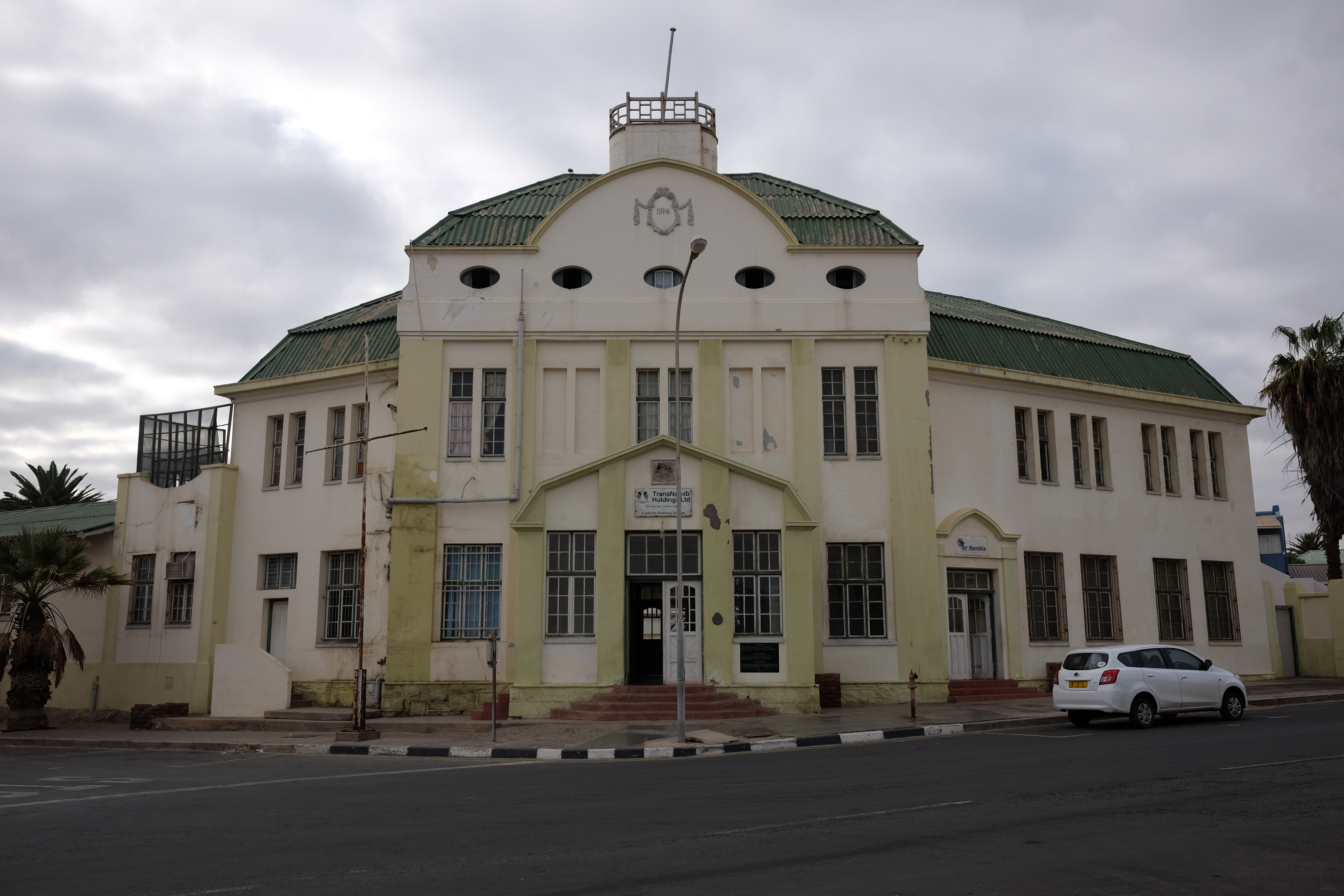 Stationen, Lüderitz. Inte längre i användning.